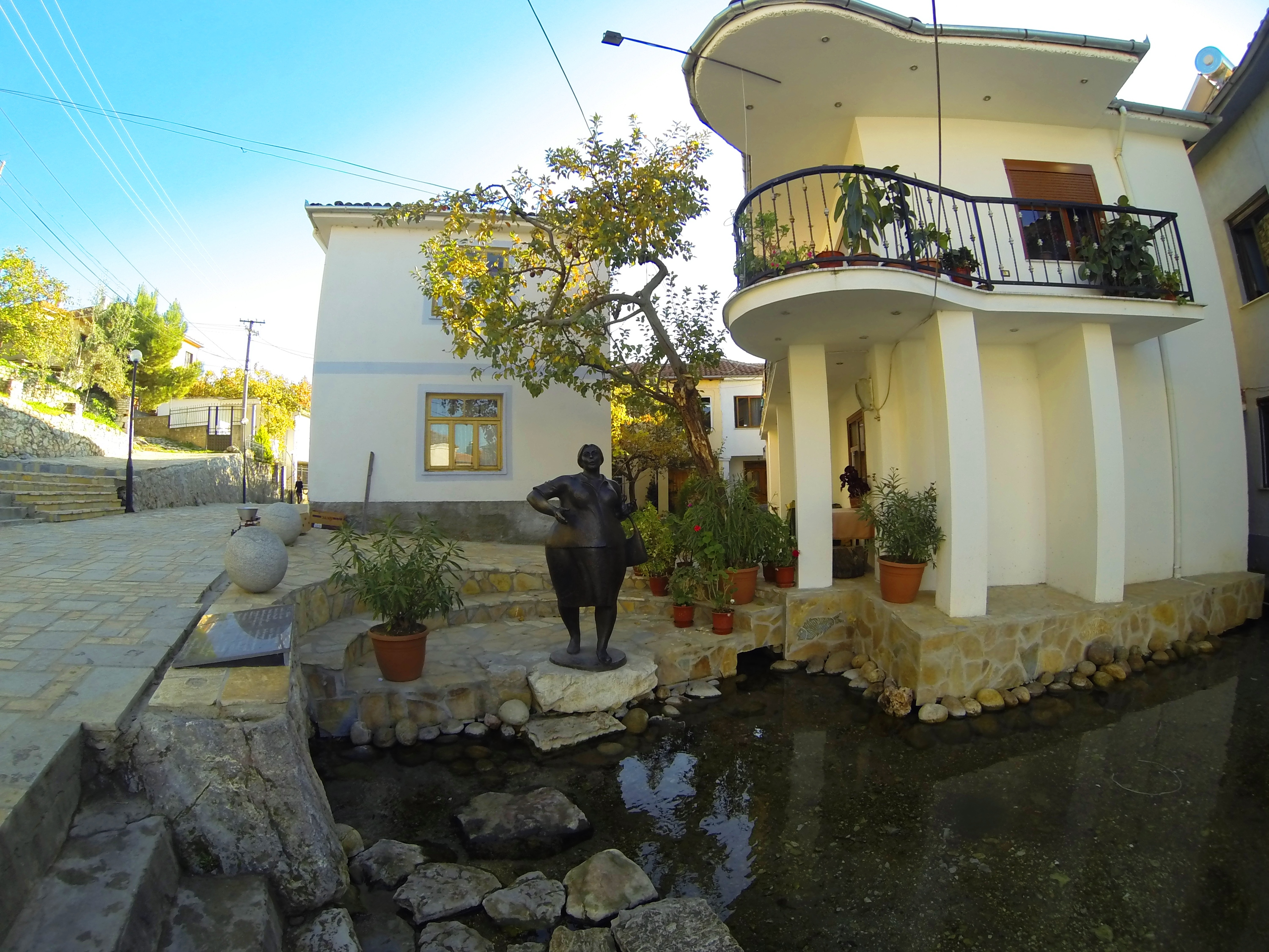 Mozaiku Ne Fshatin Tushemisht